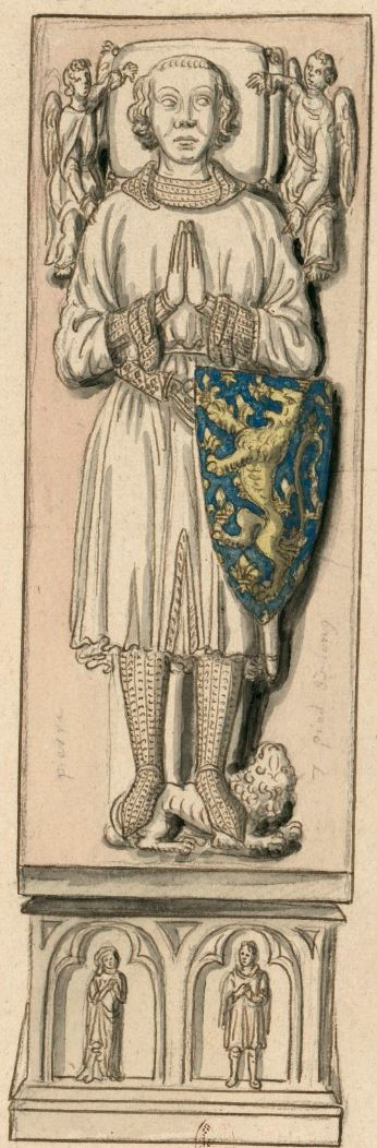 Gisant de Louis de Brienne (à l'origine dans l'abbaye d'Etival-en-Charnie)